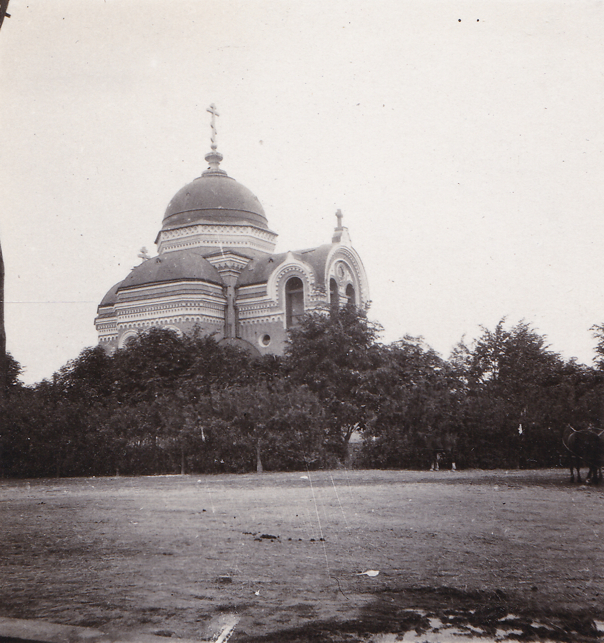 Беларуская (тарашкевіца): Ламазы (Łamazy). Казьмадзям’янаўская царква-мураўёўка